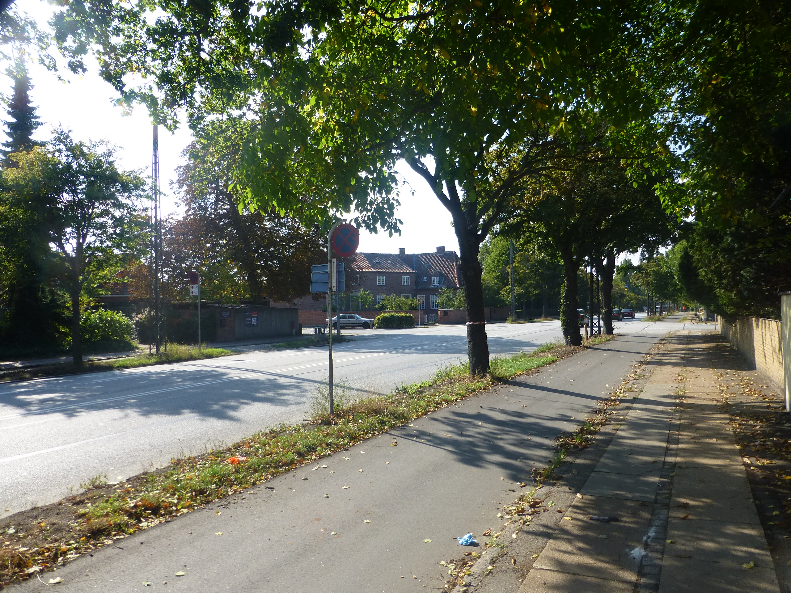 The street Tuborgvej in Hellerup in Copenhagen.